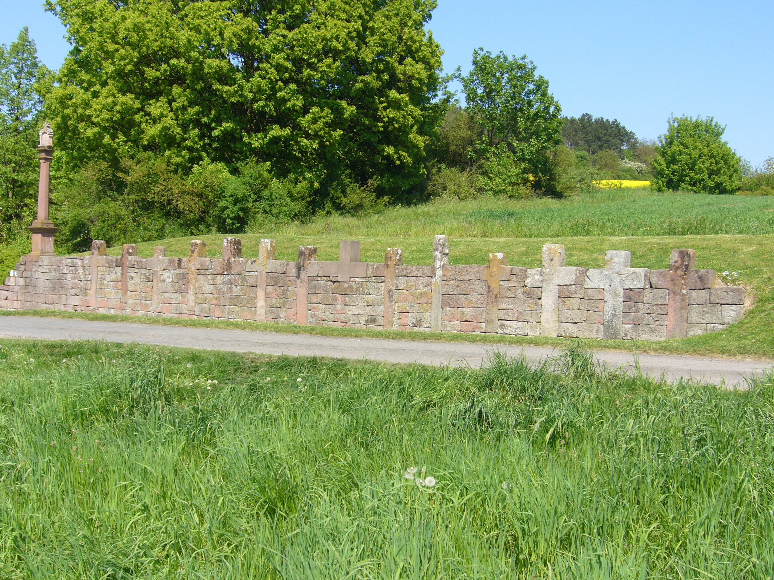 Das Steinkreuznest in Reicholzheim, größtes Steinkreuznest Deutschlands, mit 14 Rotsandsteinkreuzen. Laut der örtlichen Sage sollen sich 14 Burschen im Streit um ein Mädchen gegenseitig erschlagen haben.